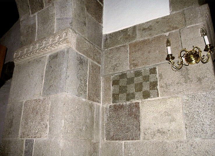 Skarp Salling Kirke i Danmark. Skaktavlkvader nord for korbuen